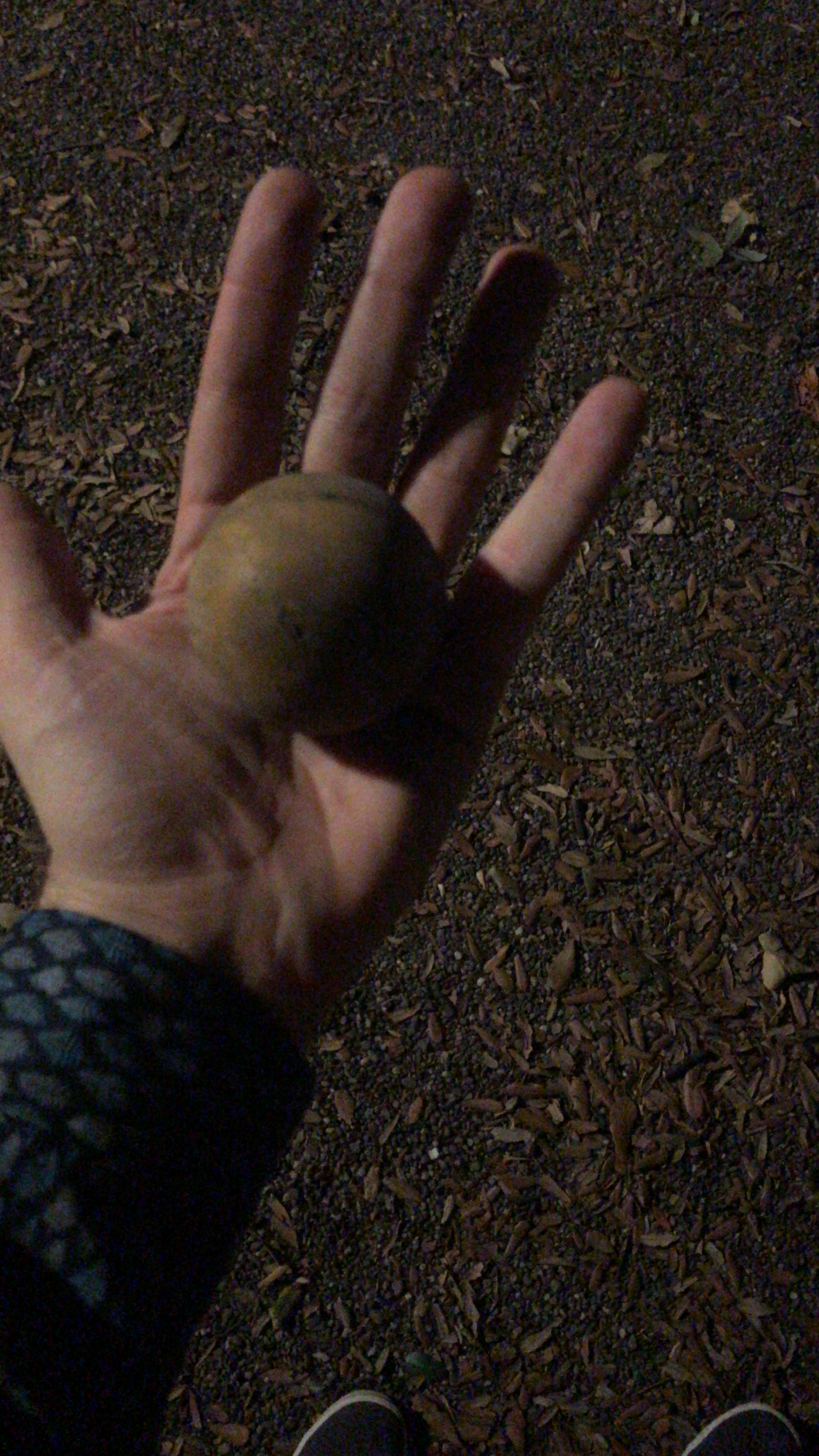 Protestes, aldarulls i càrregues el dimecres 16 d'octubre de 2019. Una pilota de goma llançada per antidisturbis de la Policia Nacional